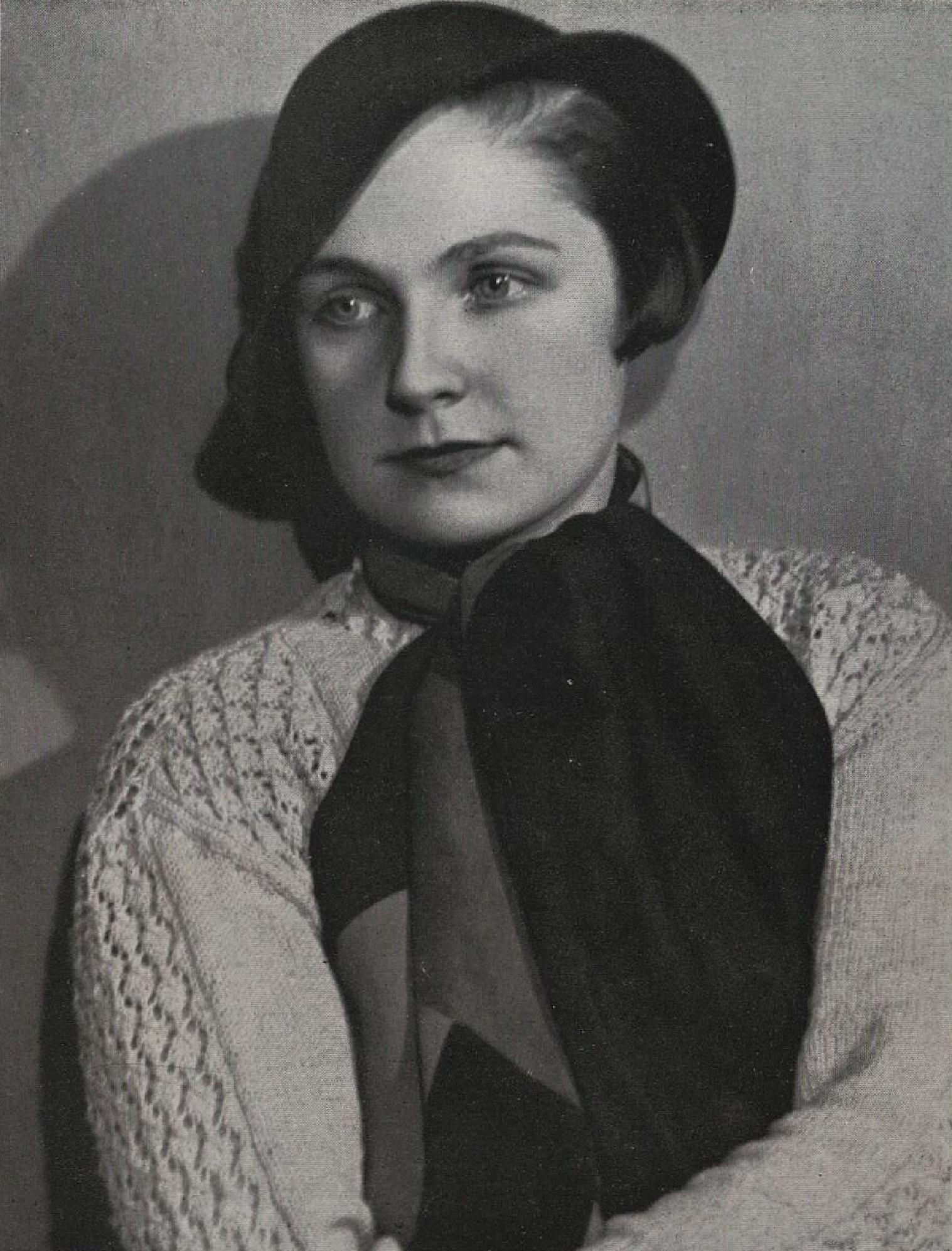 Elena Hálková (1907-1985), česká herečka